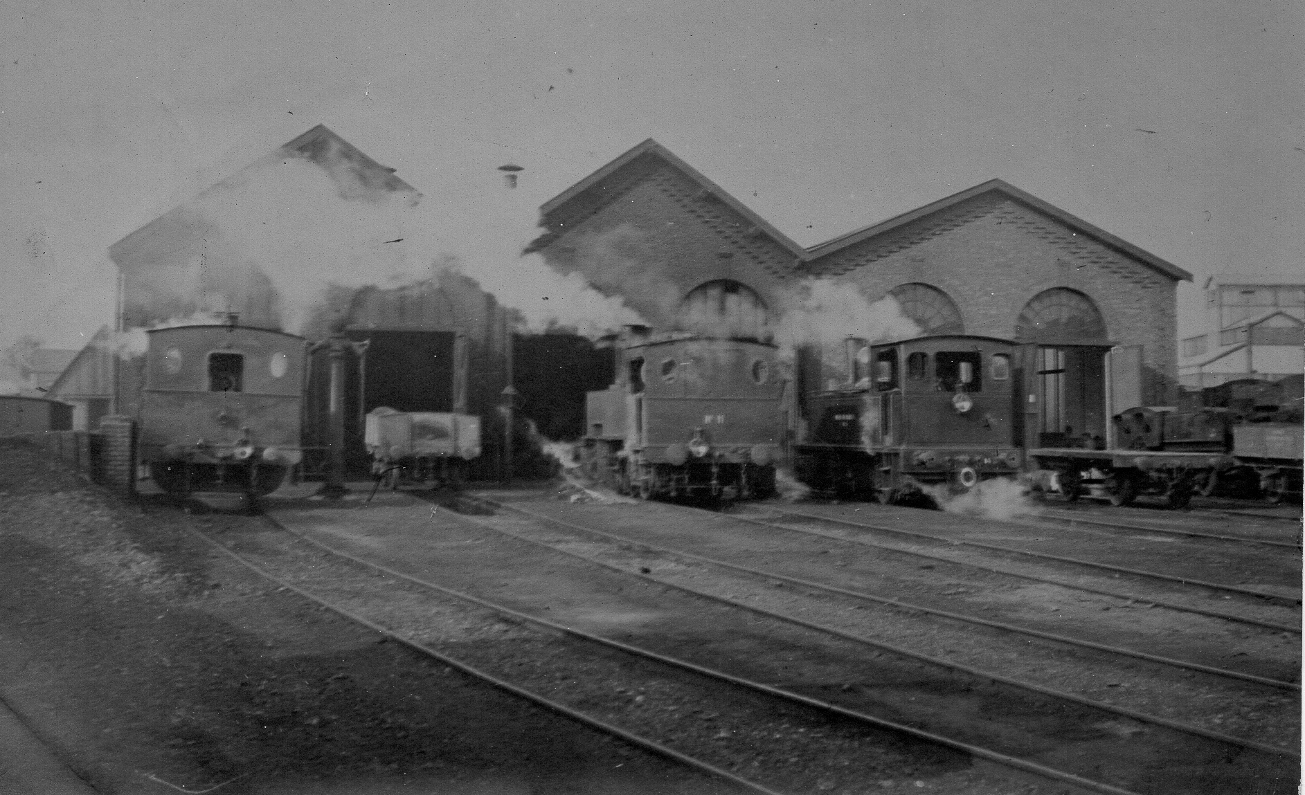 Remise des locomotives des Mines de Marles Photo originale albuminée en extérieur noir et blanc - Remise des locomotives des Mines de Marles (Pas-de-Calais) en 1905. Le document est tiré du fonds de l'album Le Cornec, ingénieur chef mécanicien. Cet ingénieur en hydrauliques et spécialiste d'installation de pompes a voyagé comme officie sur le Yacht-steamer "Sans Peur", bateau de M. Etienne Fould qui l'a acquis en 1887. Puis, à partir de 1900 on le retrouve à Auchel (Pas-de Calais) où il travaille pour la Compagnie des Mines de Marles.